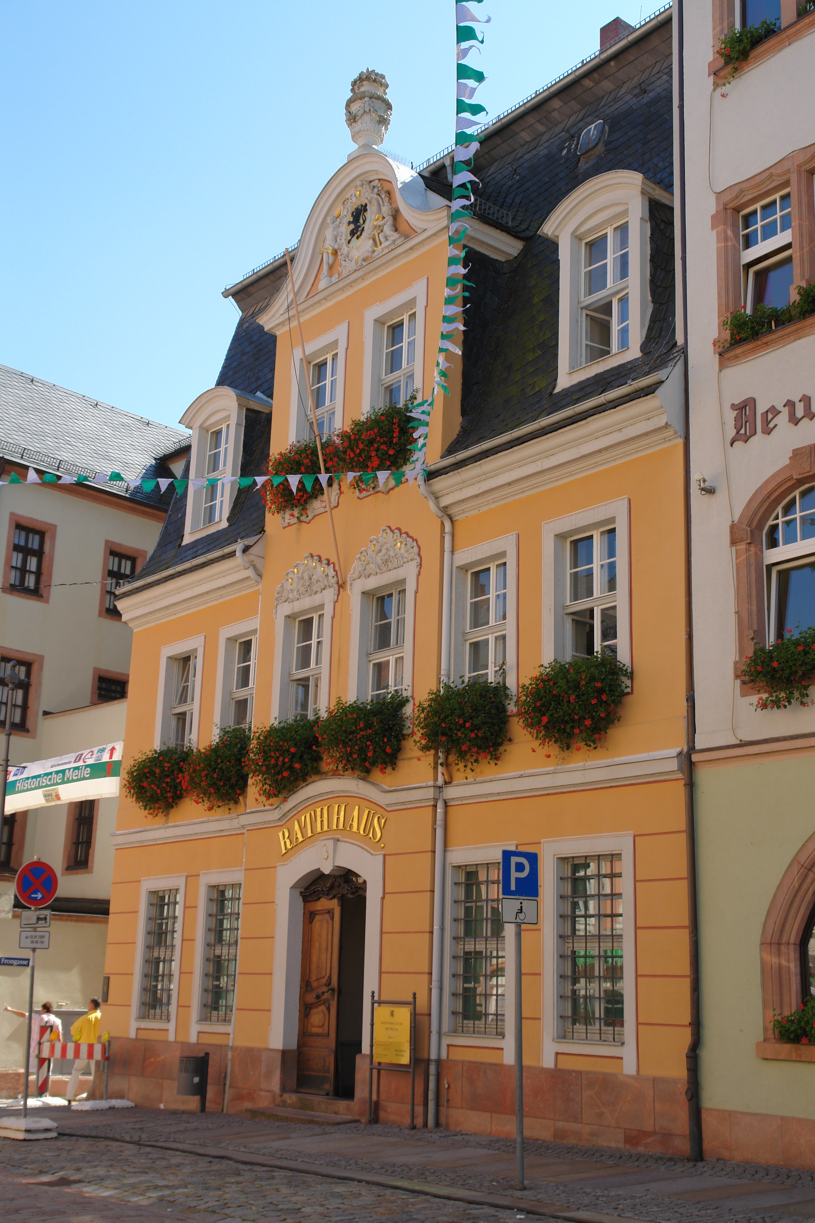 Rathaus Mittweida